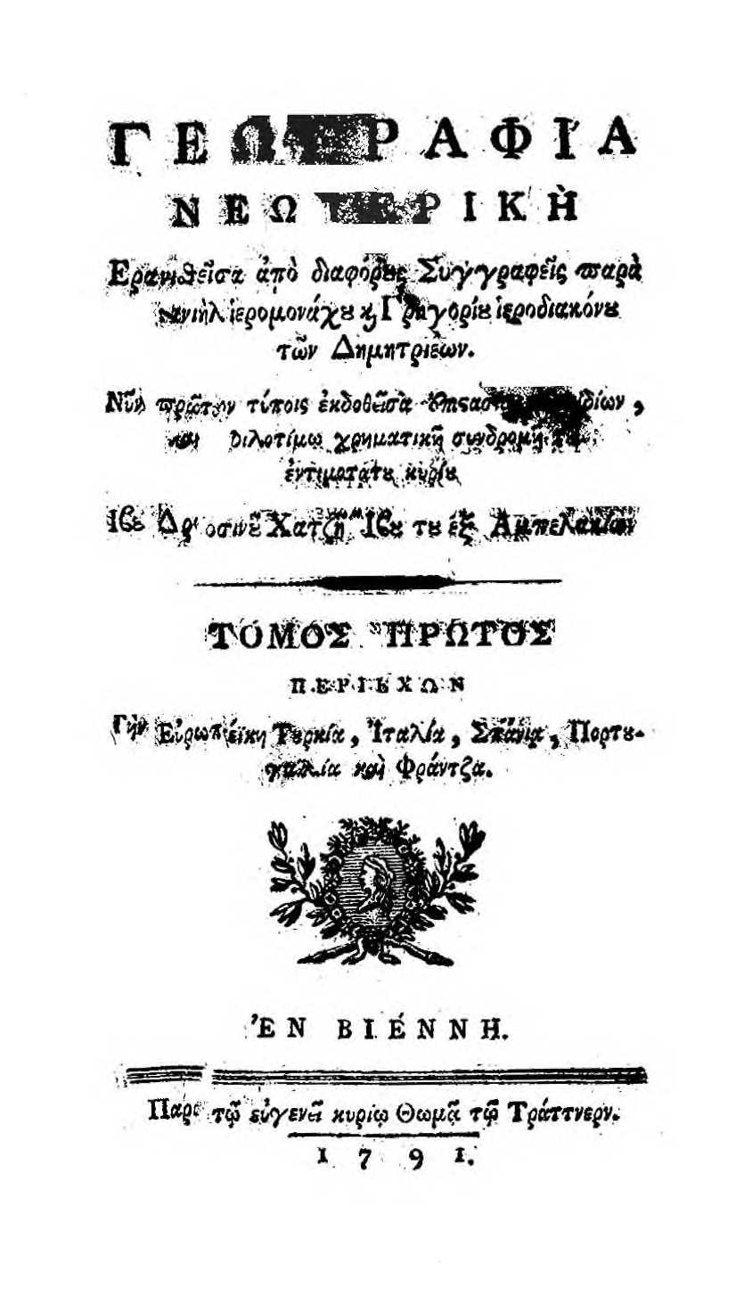 Geografia Neoteriki (in Greek: Γεωγραφία Νεωτερική), cover page